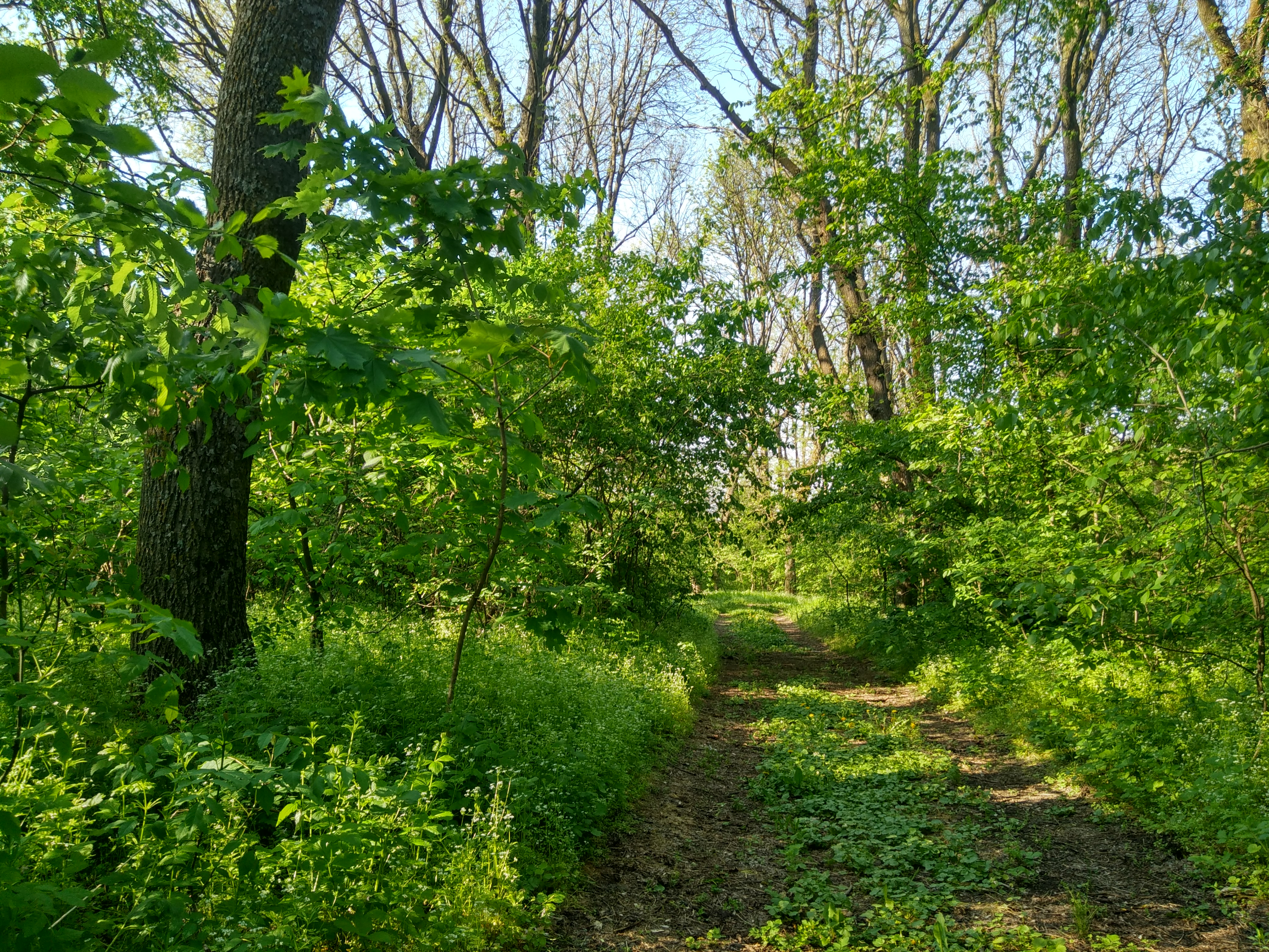 Parcul din satul Rediul Mare, monument al naturii amplasat în raionul Dondușeni, satul Rediul Mare (cod MD-DN-map-009)